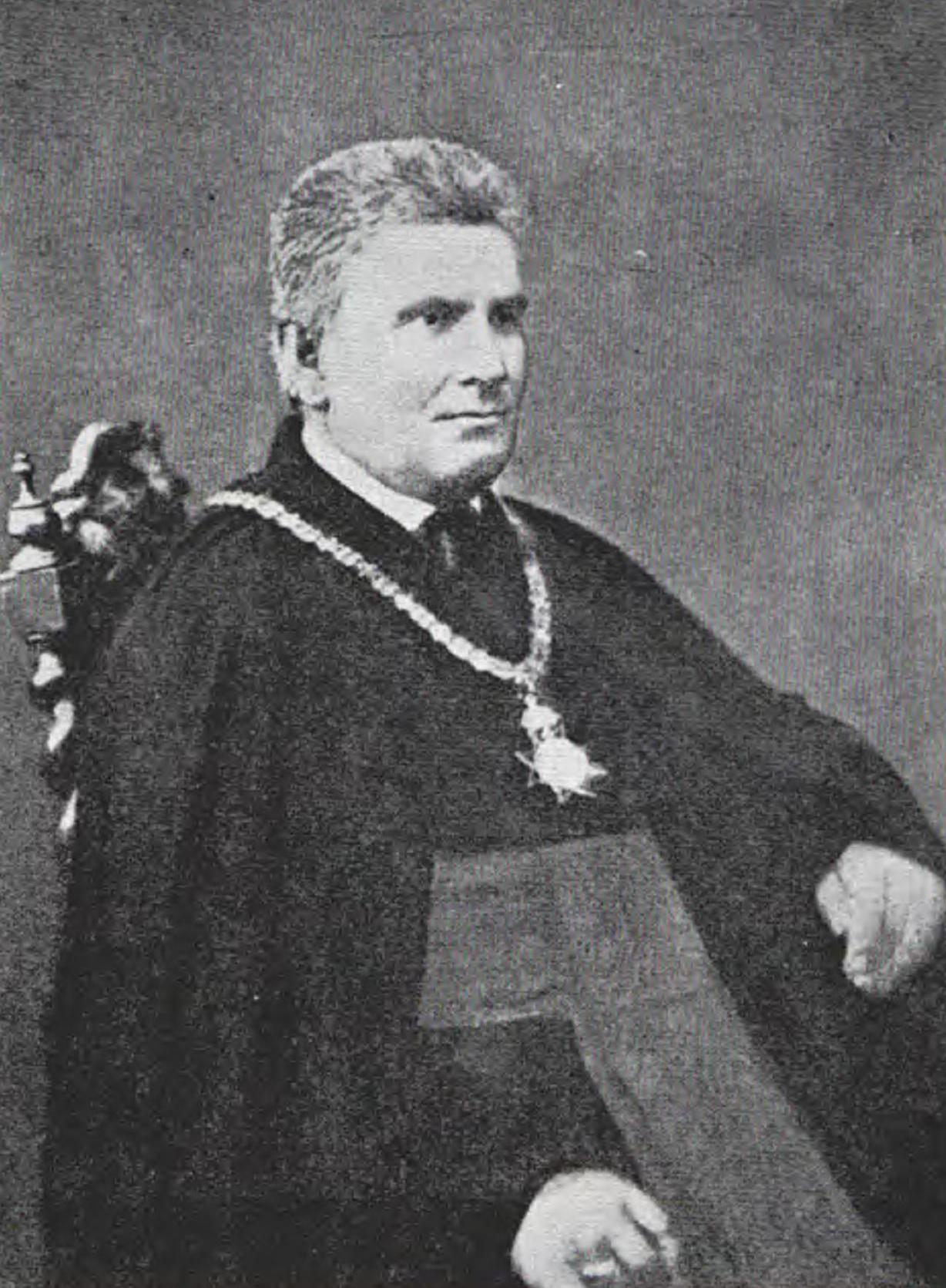 Климентій Сарницький (1832-1909) - священик василіянин, ректор Львівського університету, протоігумен, ініціатор Добромильської реформи